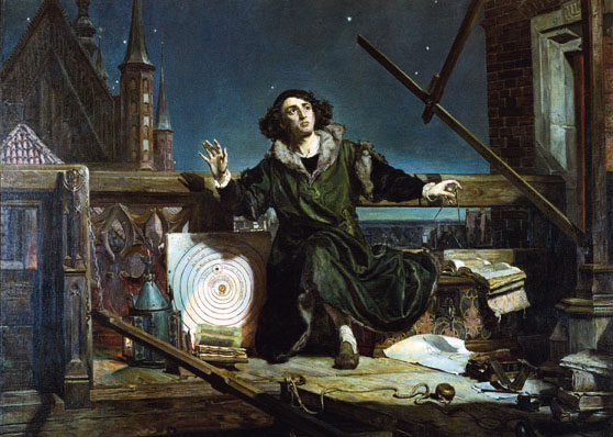 Nikolaus Kopernikus beim Beobachten der Gestirne (Detail von Jan Matejkos Gemälde)